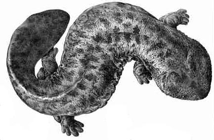 Andrias japonicus (synonym Cryptobranchus japonicus)."Cryptobranchus japoniens Y. de Hoev. (Japanischer Riesensalamander.) Nach einer Photographie gezeichnet, in etwas mehr als 1/3 der natürlichen Grösse."